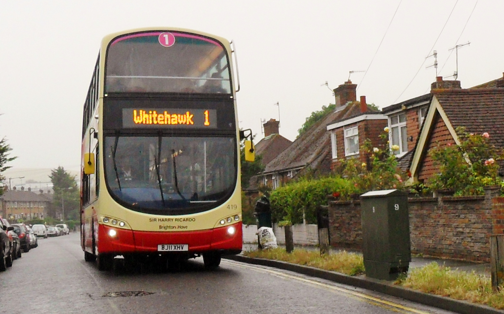 A|t Portslade.